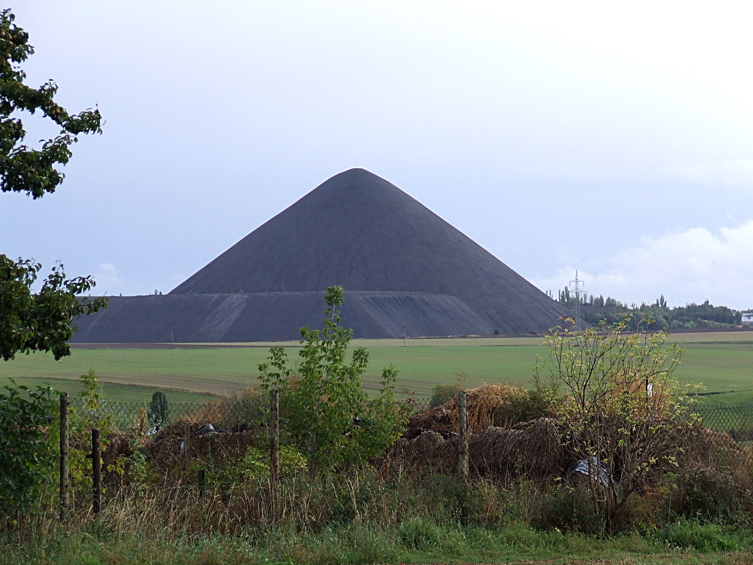 Halde des Ernst Thälmann-Schachtes (ehem. Vitzthum-Schacht) bei Siersleben vom Otto Brosowski-Schacht aus fotografiert